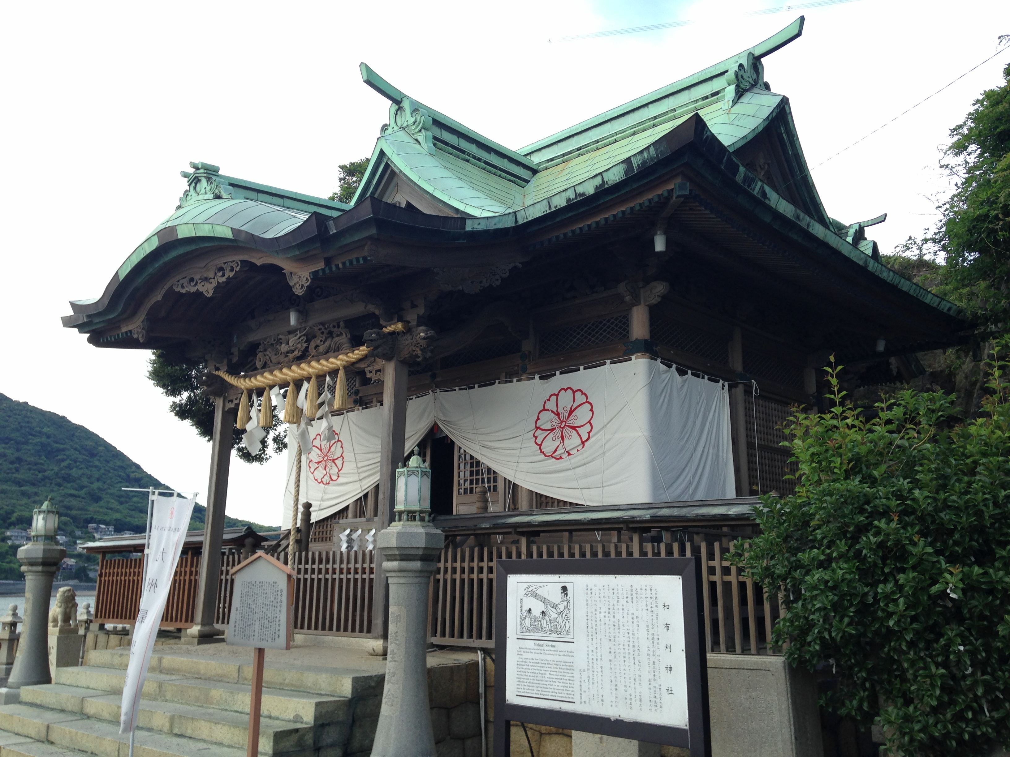 和布刈神社の拝殿